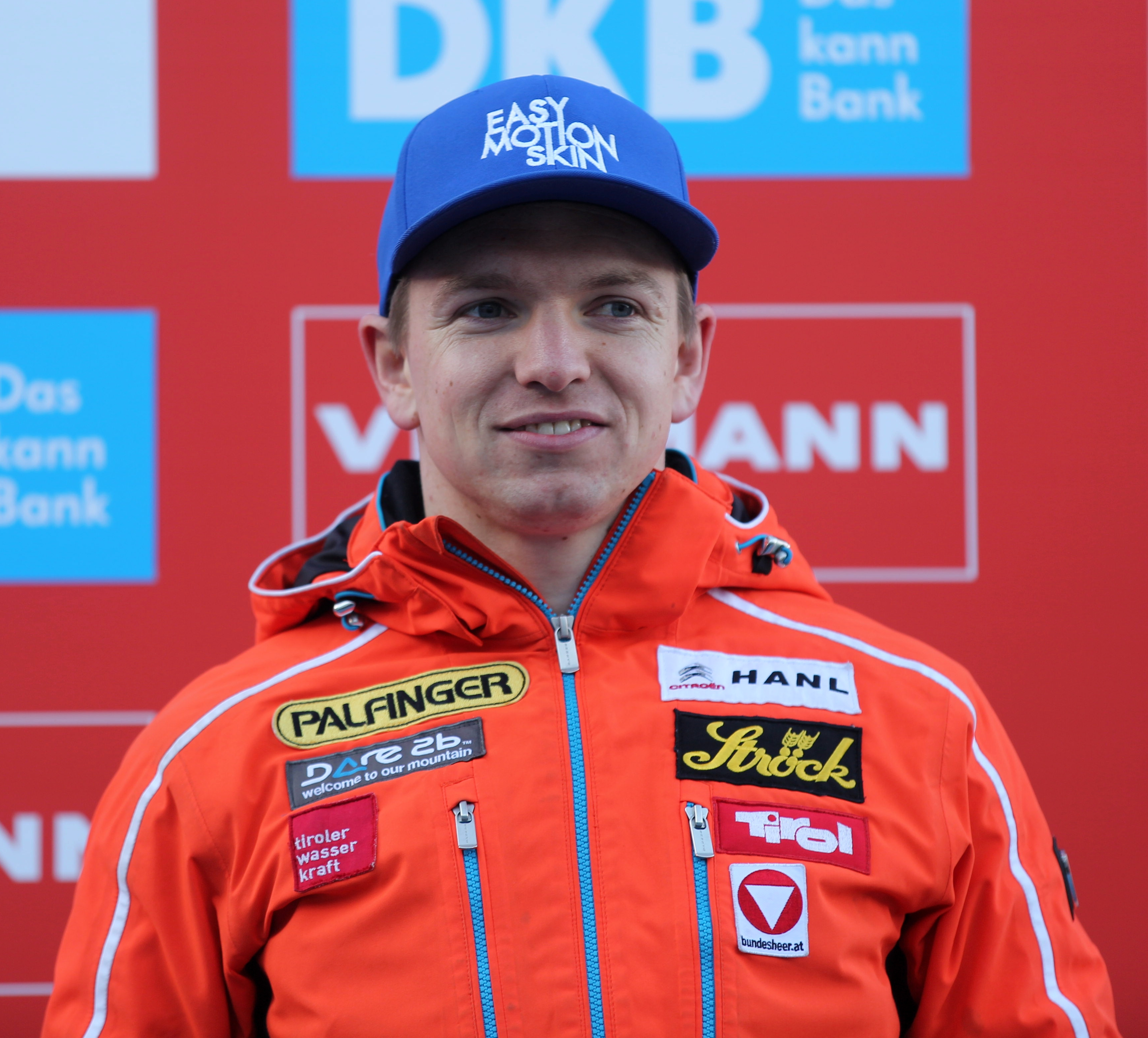 Wolfgang Kindl bei der Siegerehrunng in Altenberg 2017